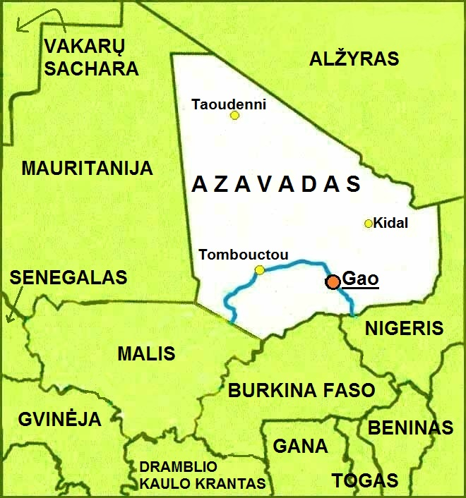 Azavadas žemėlapis